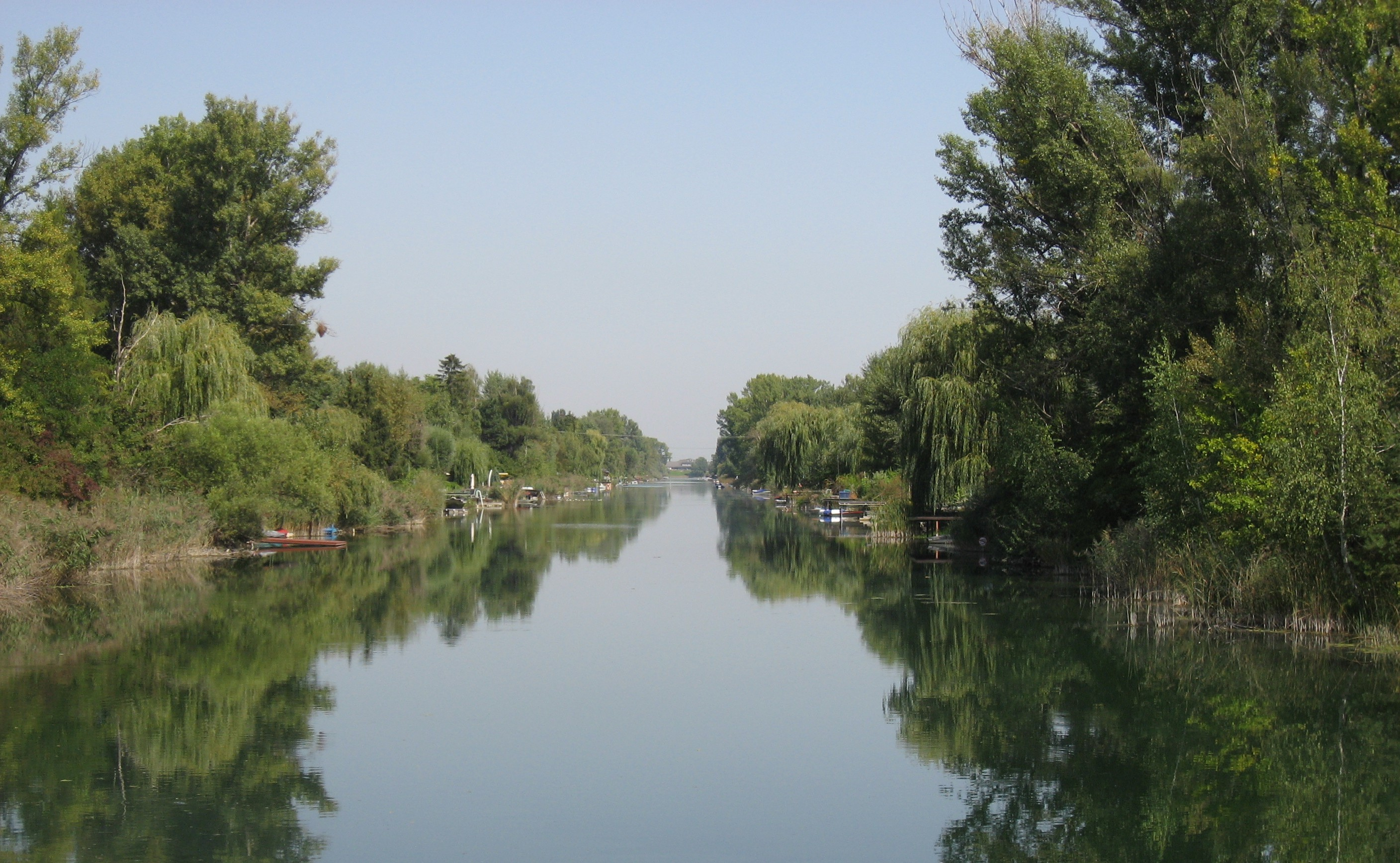 Donau-Oder-Kanal in Wien Donaustadt, Bereich Lobaustraße